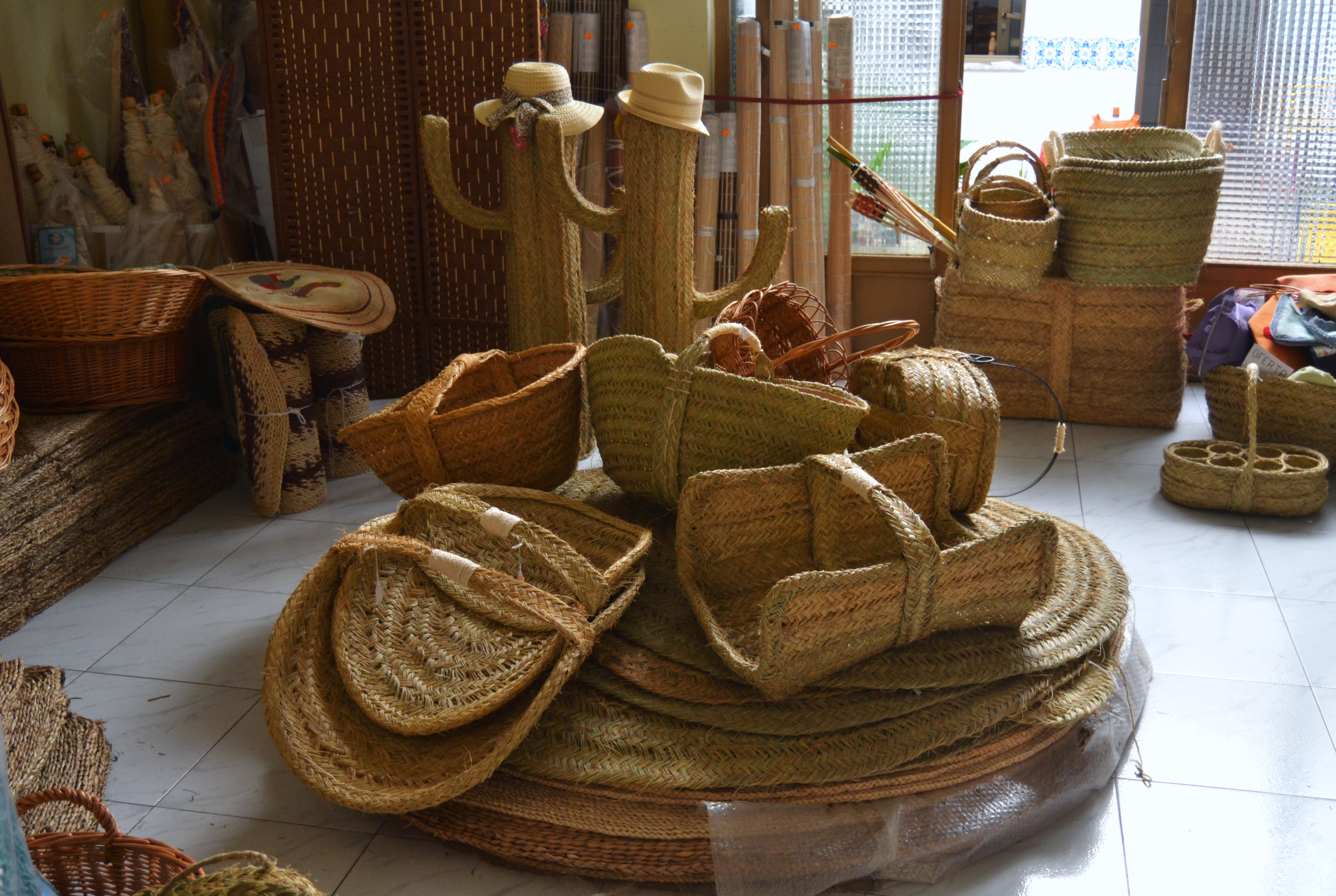 Interior d'un comerç d'artesania de Gata de Gorgos.